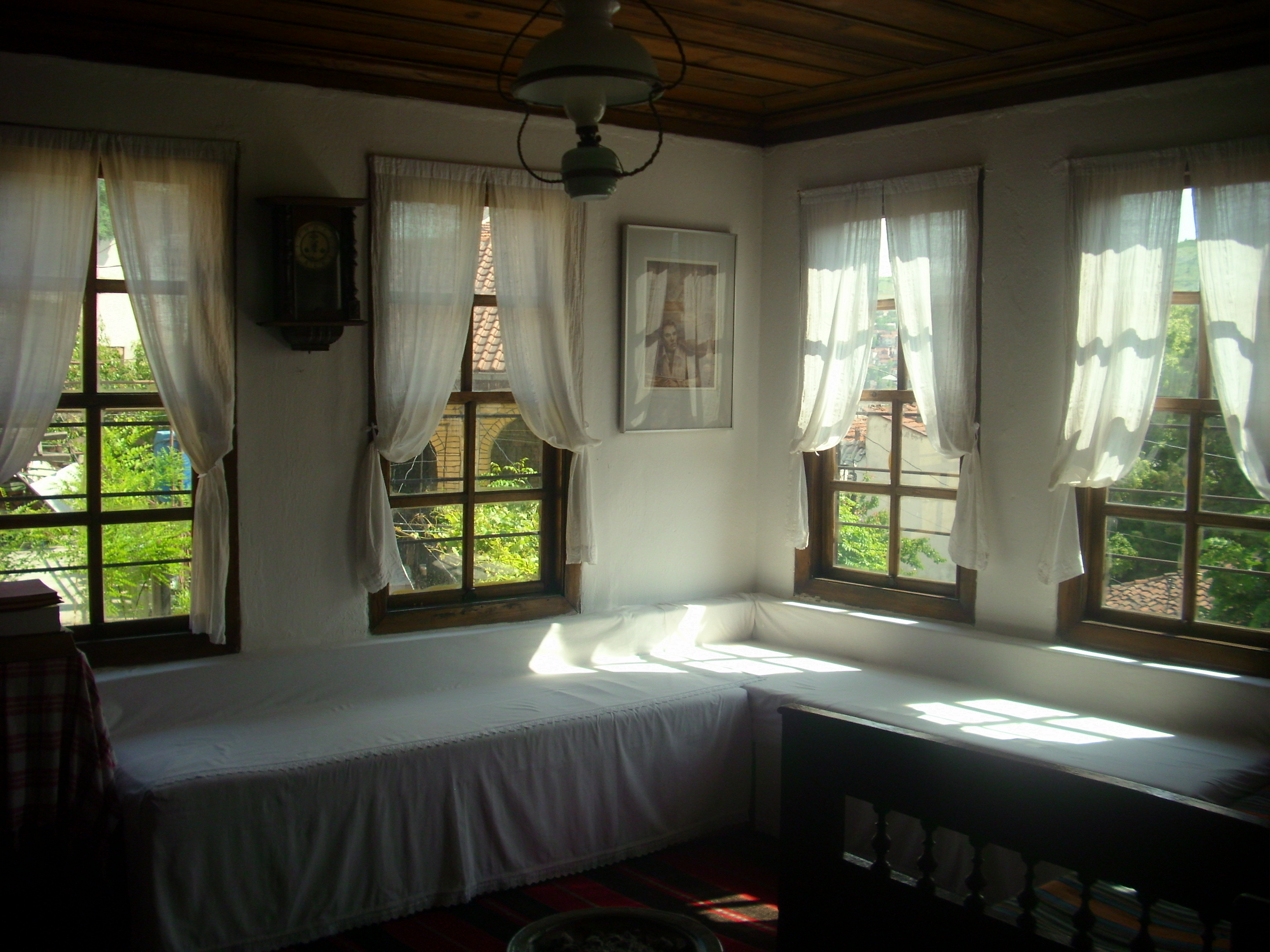 Куќата на Кочо Рацин, Велес